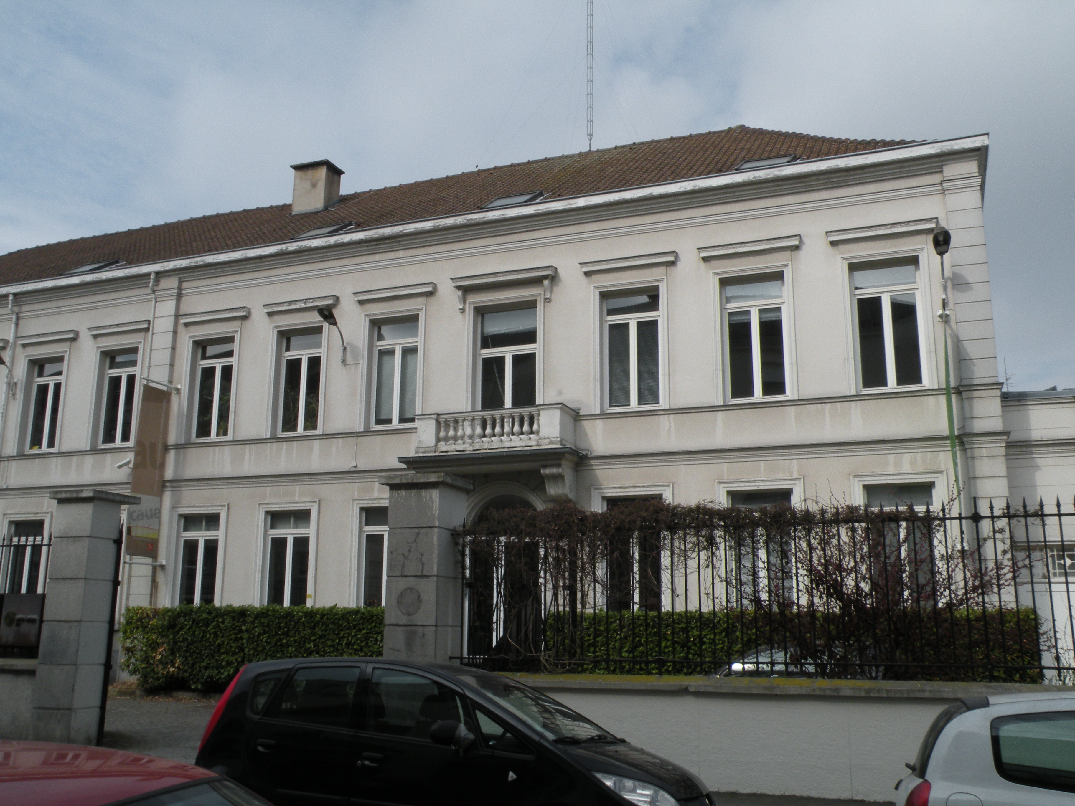 Le Goethe-Institut de Lille.